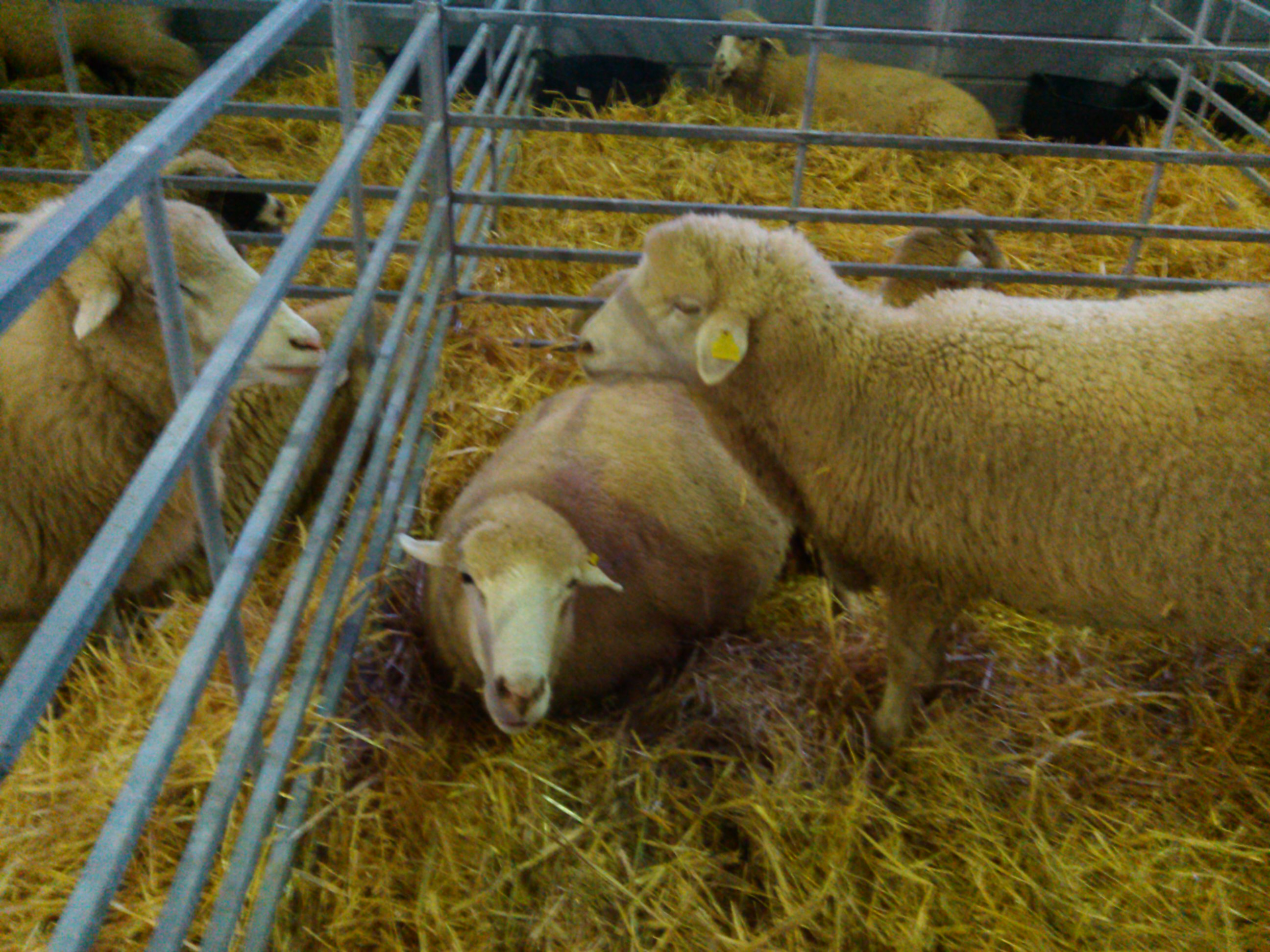 Ovejas de raza Merina de Grazalema en FEGASUR 2015, feria de ganadería en Jerez de la Frontera, Cádiz.